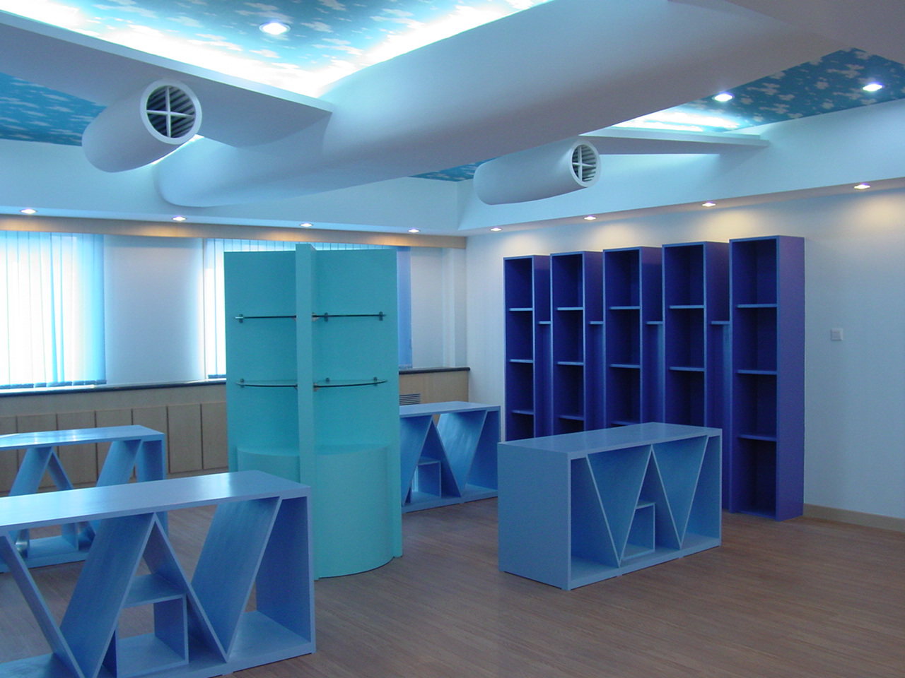 北京育民小学位于东楼的航模教室。